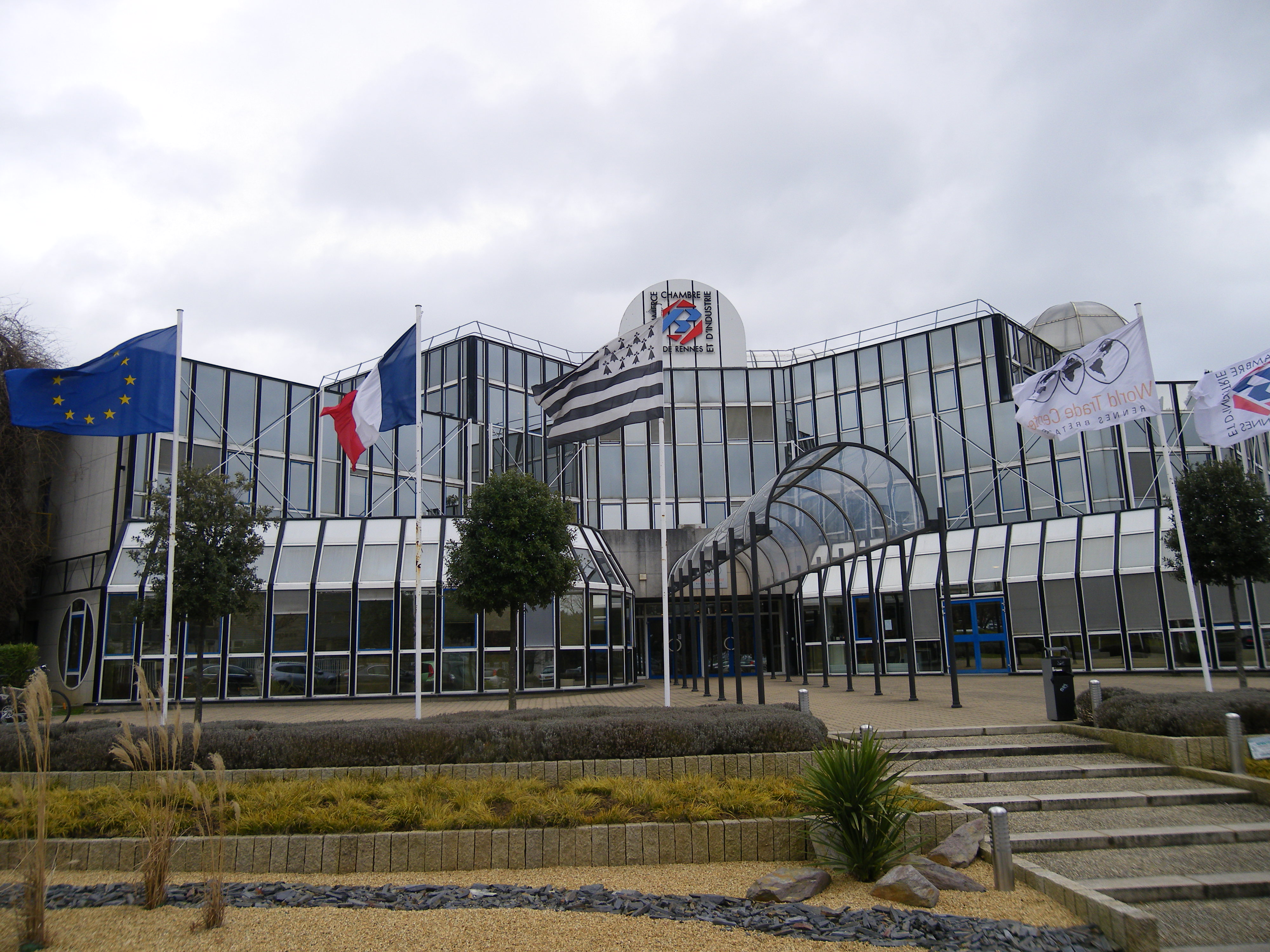 chambre de commerce et d'industrie de rennes